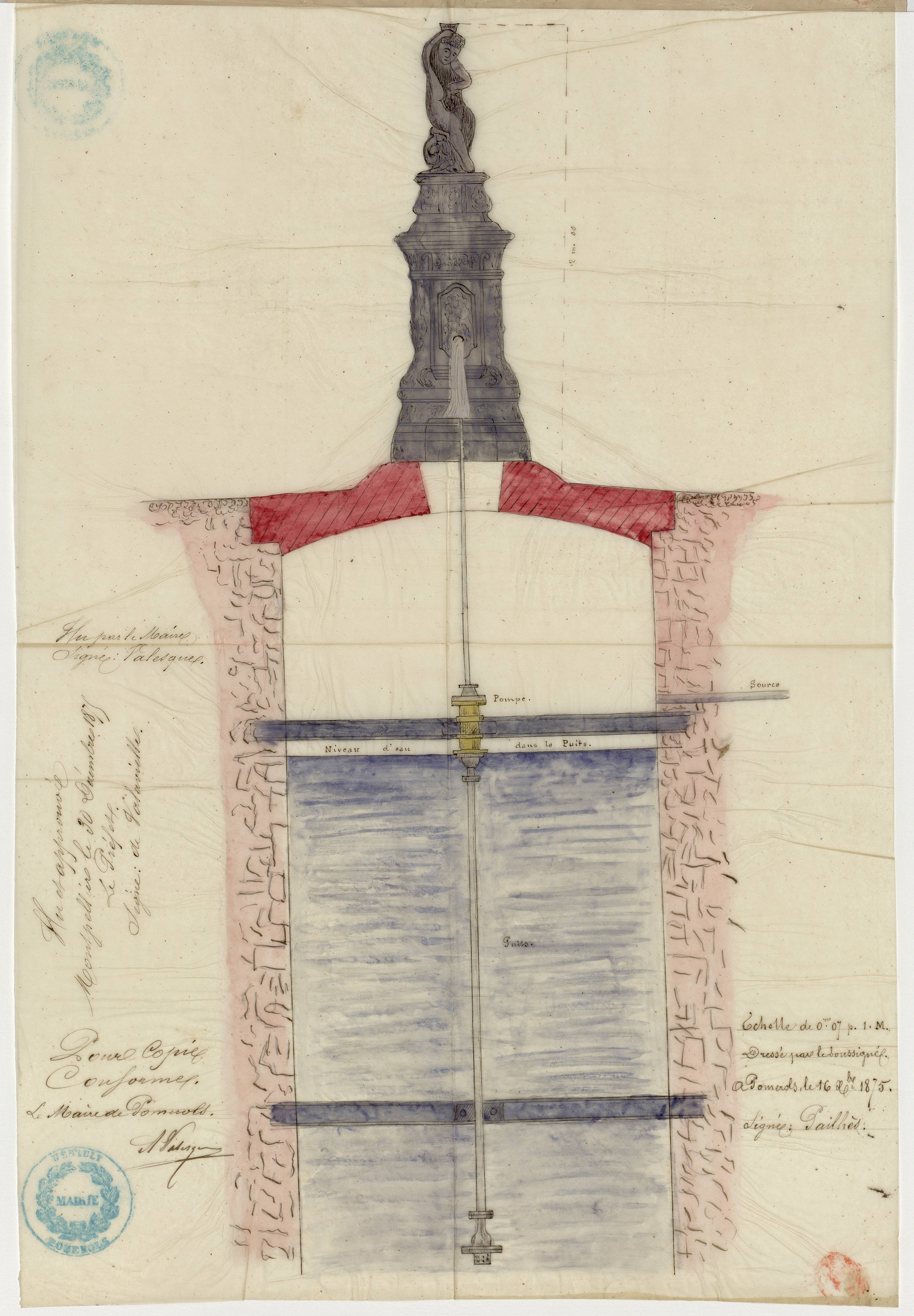 Pomérols. - Adduction d'eau potable. Établissement d'une borne fontaine sur la place publique : dessin du projet.